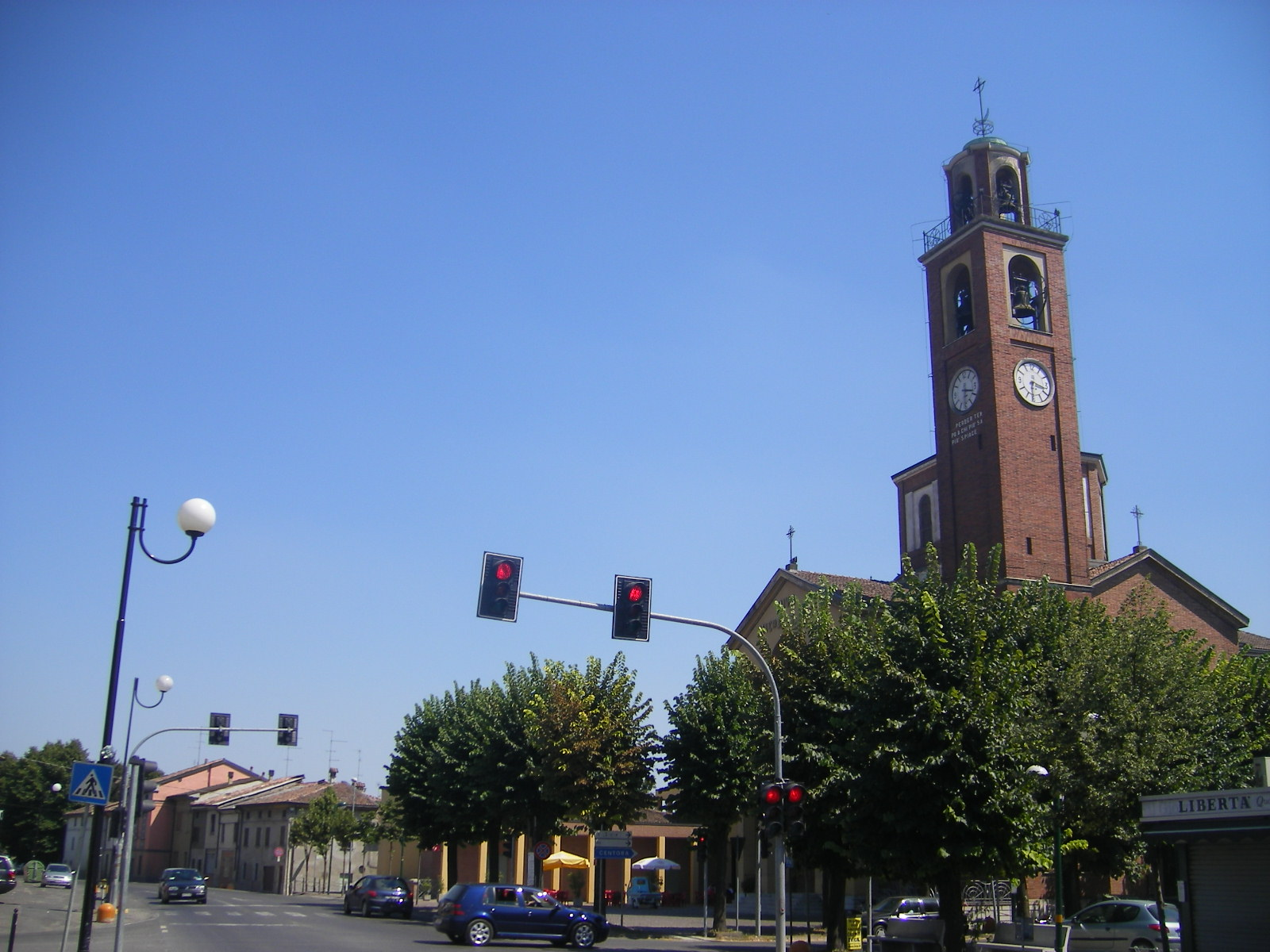 Rottofreno